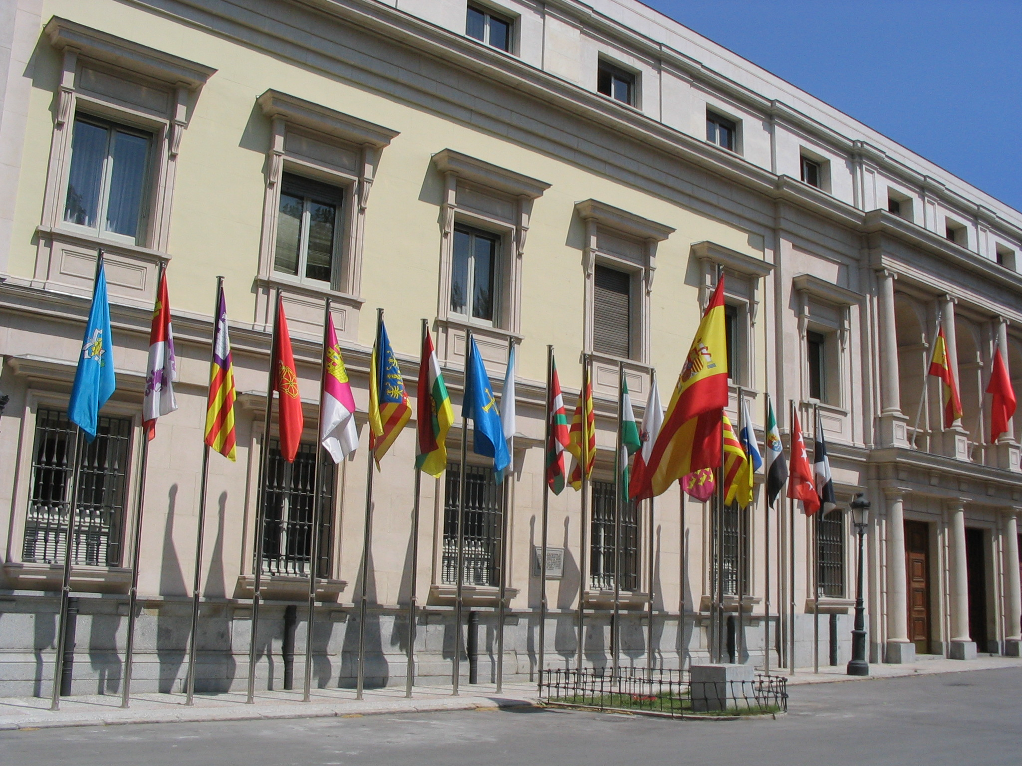 Les différents drapeaux des communautés autonomes espagnoles devant la facade du Sénat, à Madrid.